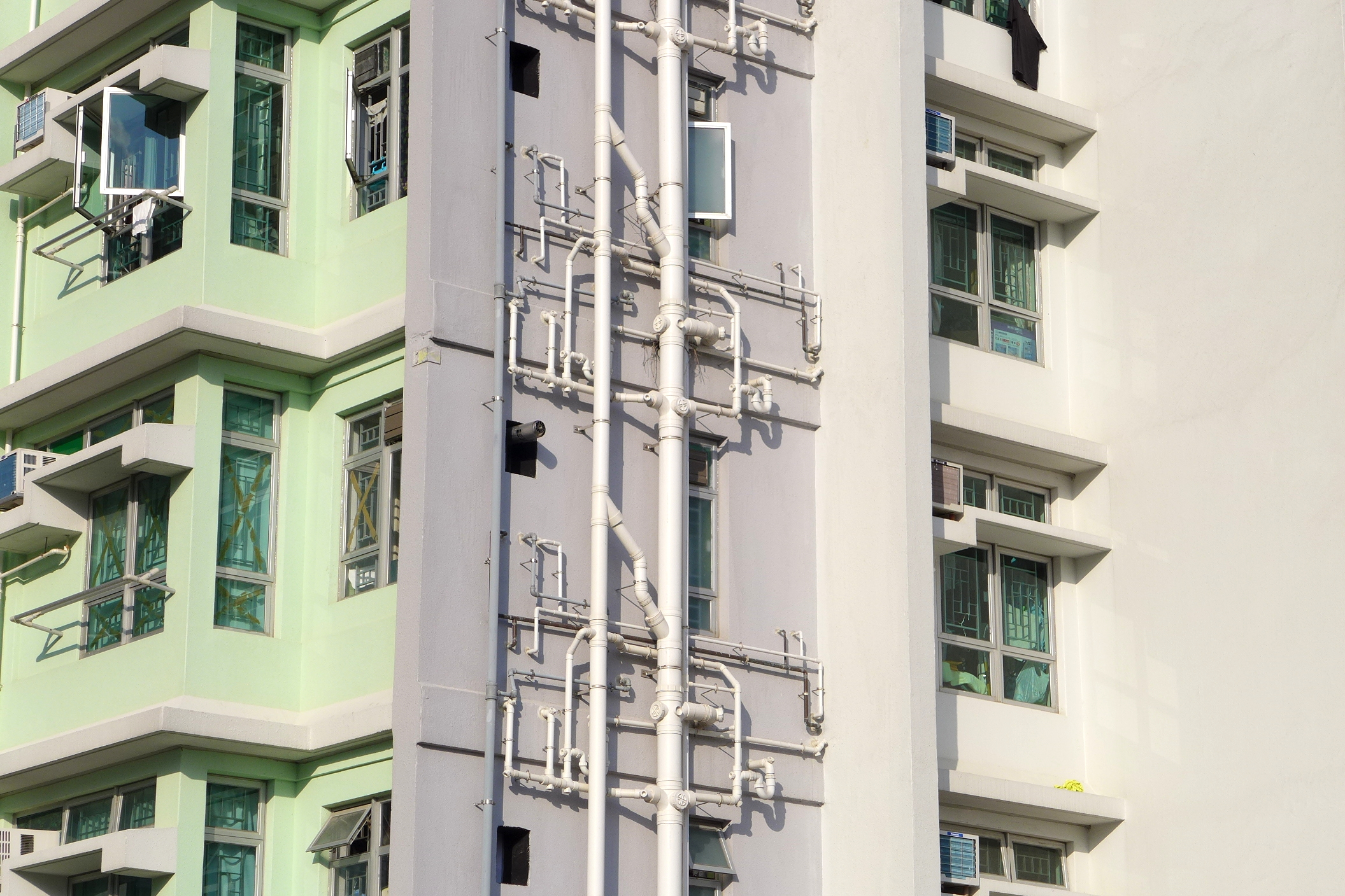 Kai Ching Estate Water tube